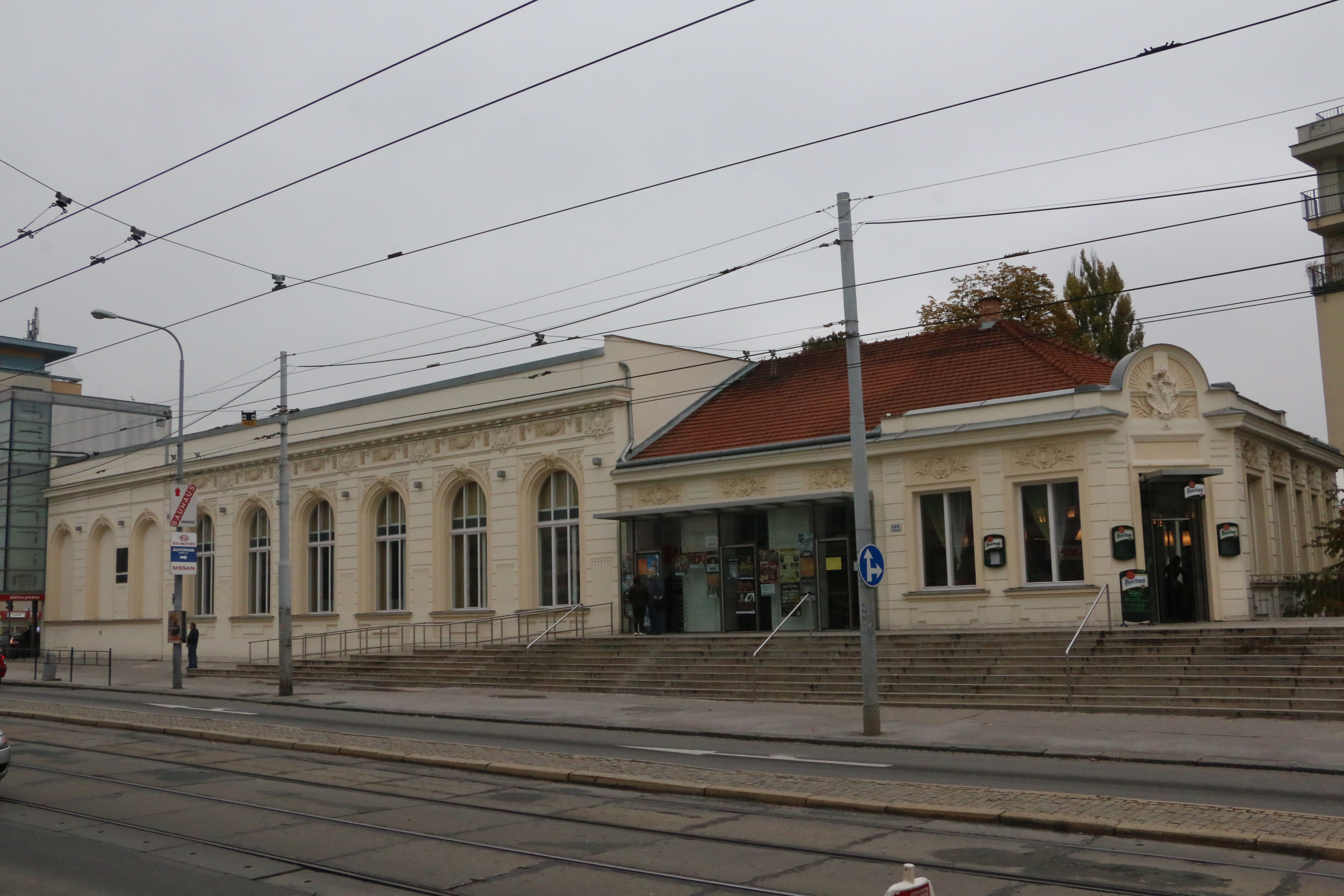 Budova kulturního centra Semilasso v Brně-Králově Poli v roce 2016